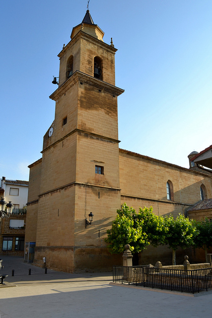 Lanciego